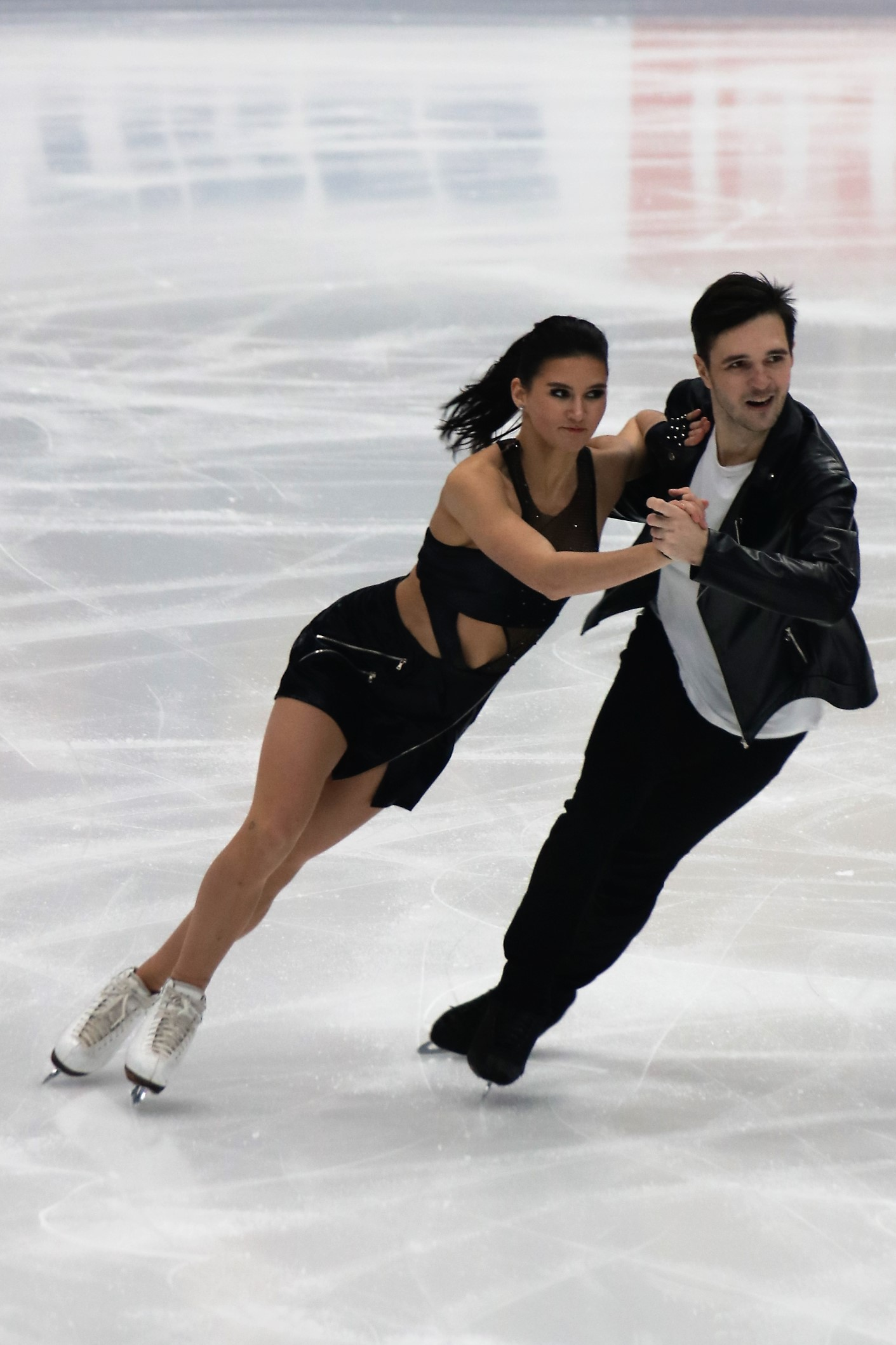 Софья Евдокимова и Егор Базин (Россия) на Rostelecom Cup 2018